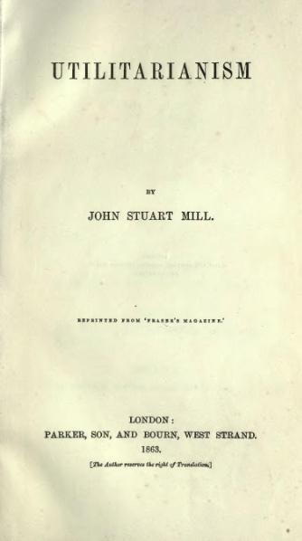 "Utilitarismo" Fecha de publicación: 1863 Editorial Londres: Parker, Son y Bourn Colección saint_marys_college ; Toronto Patrocinador digitalizador Instituto Nacional de Estudios Newman. Colaborador de Saint Mary's College de California Idioma ingles